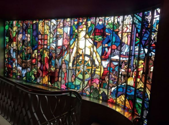 vitrail du siège administratif du port autonome de Liège.